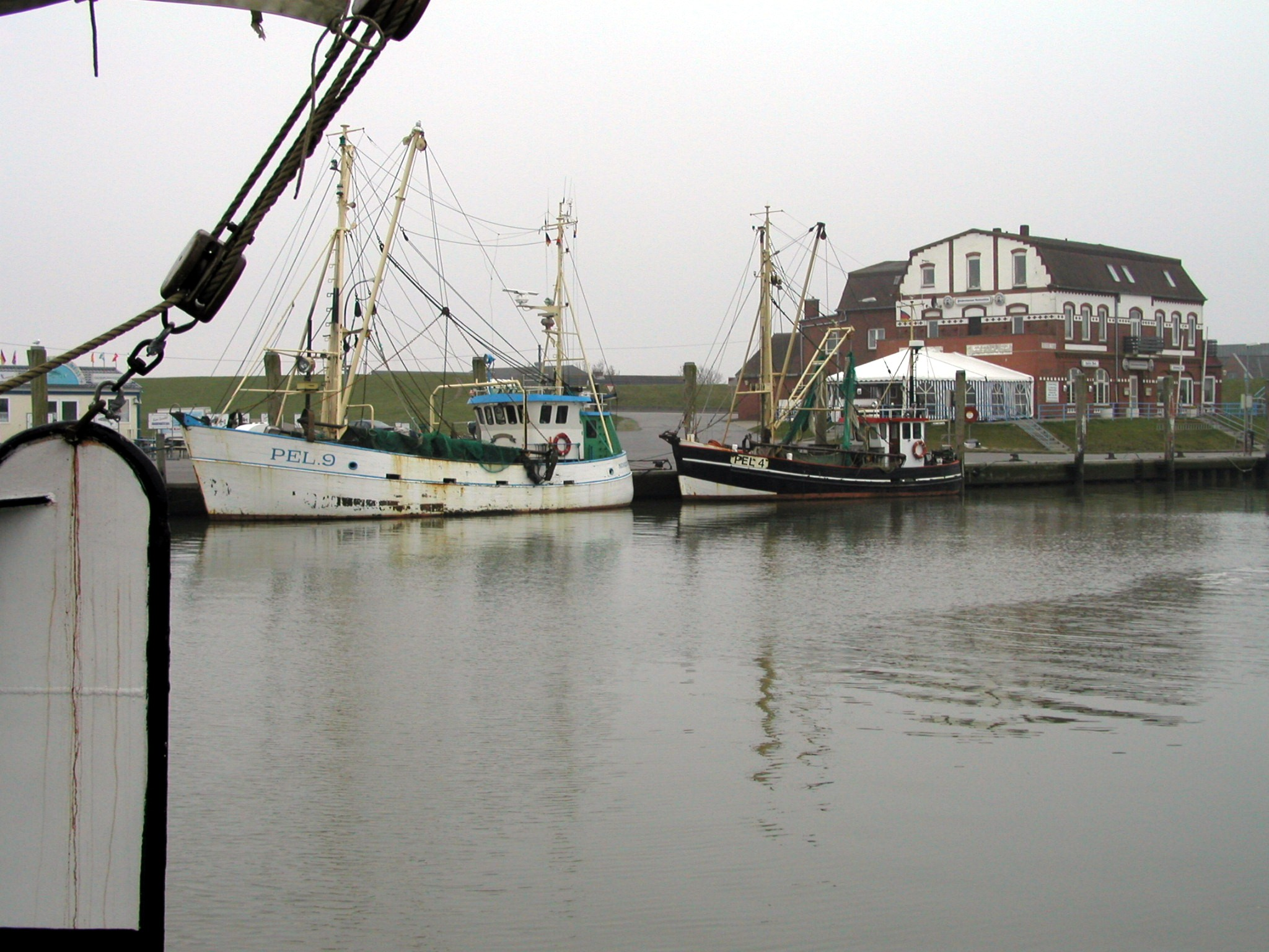 Pellworm Hafen Tammensiel